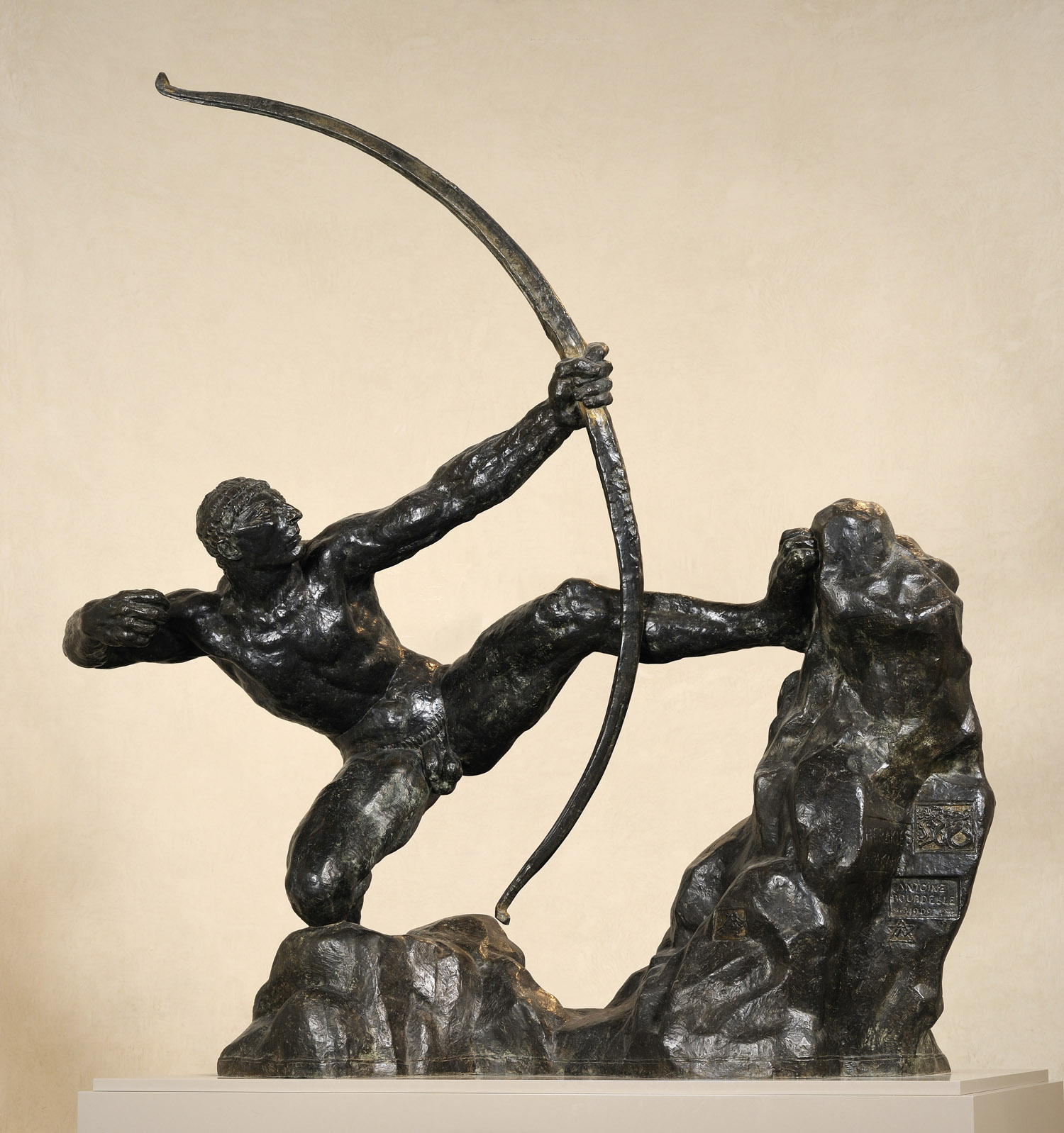 sculpture